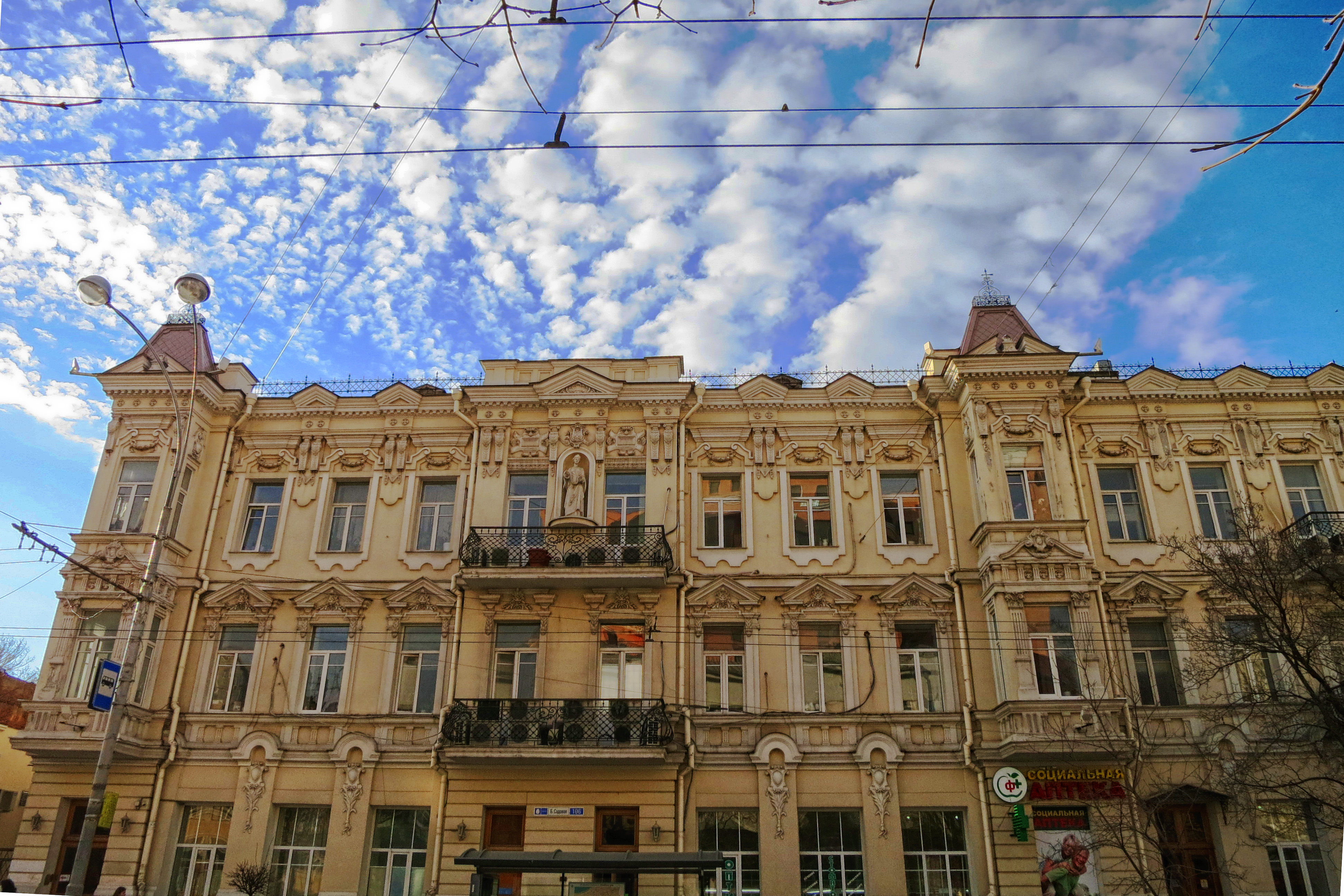 Доходный дом Н.И. Токарева: улица Большая Садовая, 106/46, проспект Чехова, литеры А, Б, Ростов-на-Дону, Ростовская область